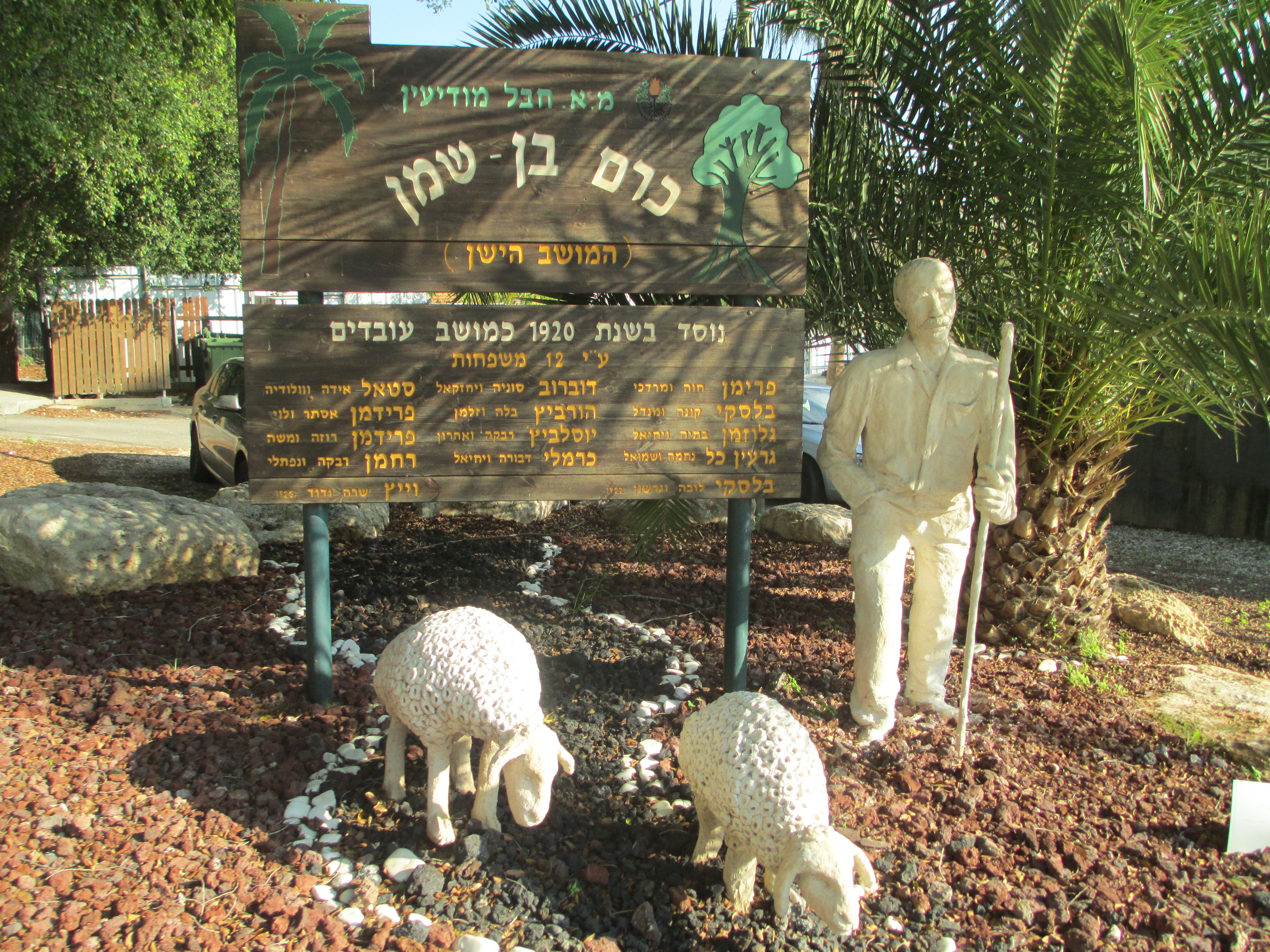 שלט בכניסה לכרם בן שמן